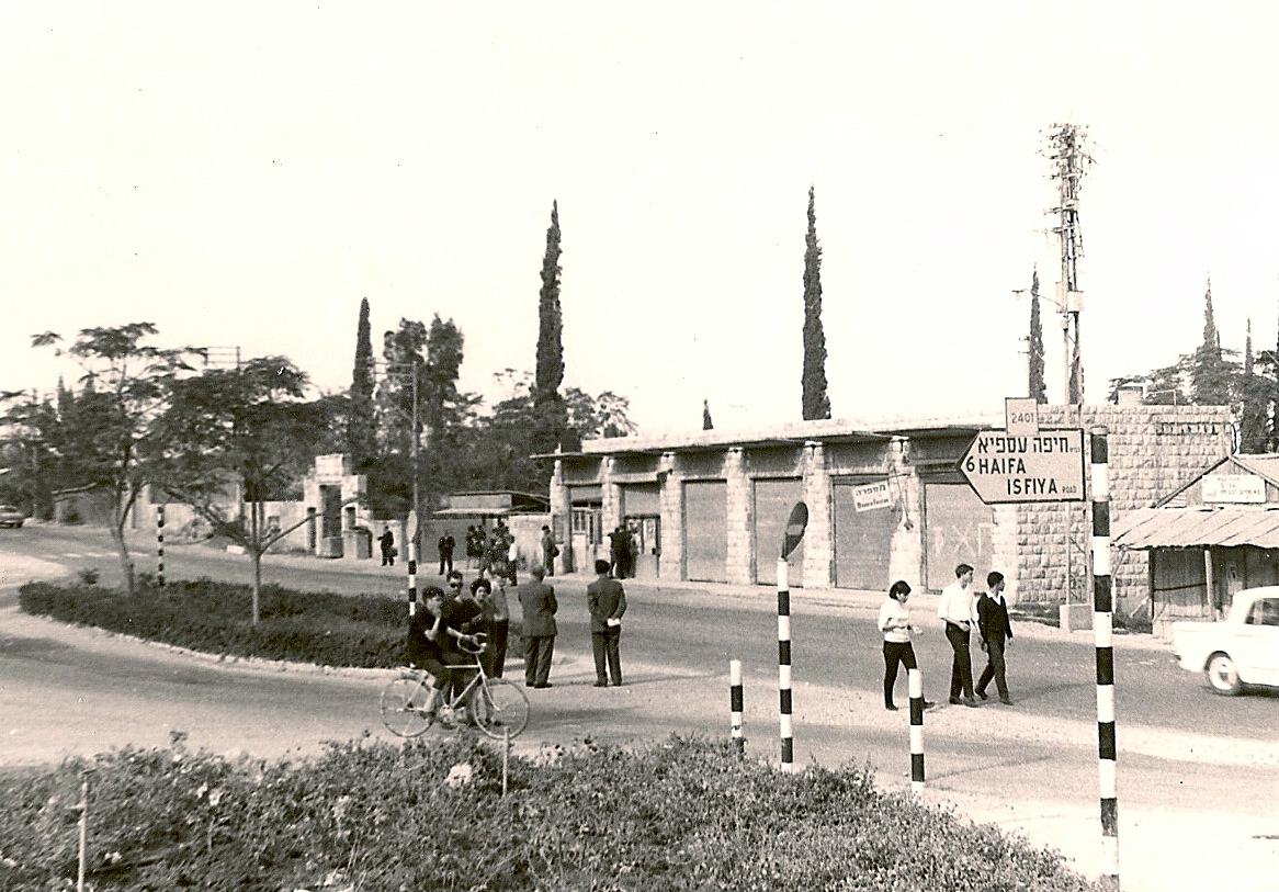 מרכז שכונת נשר הוותיקה בשנות ה-60 של המאה ה-20. זה המרכז ששימש את השכונה גם לפני מלחמת העצמאות. הצילום הוא לכיוון צפון. בתמונה רואים שורת חנויות מאבן ומשמאל הכניסה לבית הקברות המוסלמי של חיפה שנבנה ב-1934 על ידי הווקף בתוך השכונה היהודית למרות בקשות התושבים לא לעשות שאת מחשש לכך שבית הקברות ינוצל כמקום שישמש לפגיעה בתושבים היהודים של נשר שגרו בצריפי עץ לא מוגנים. מבנה החנויות נהרס בעקבות סלילת כביש 752 ובניית הגשר מעל בית הקברות המוסלמי